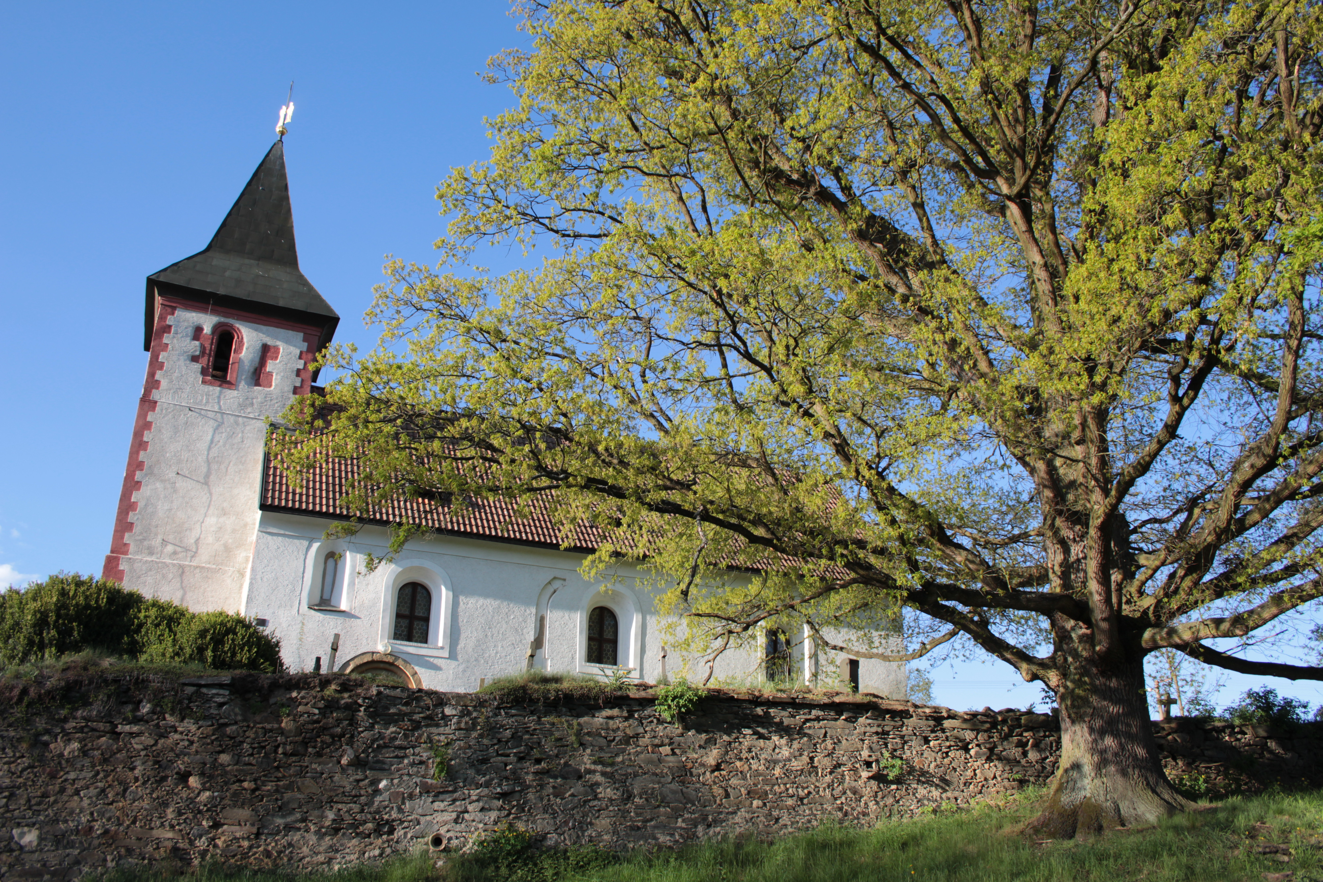 Památný dub ve Skvříně